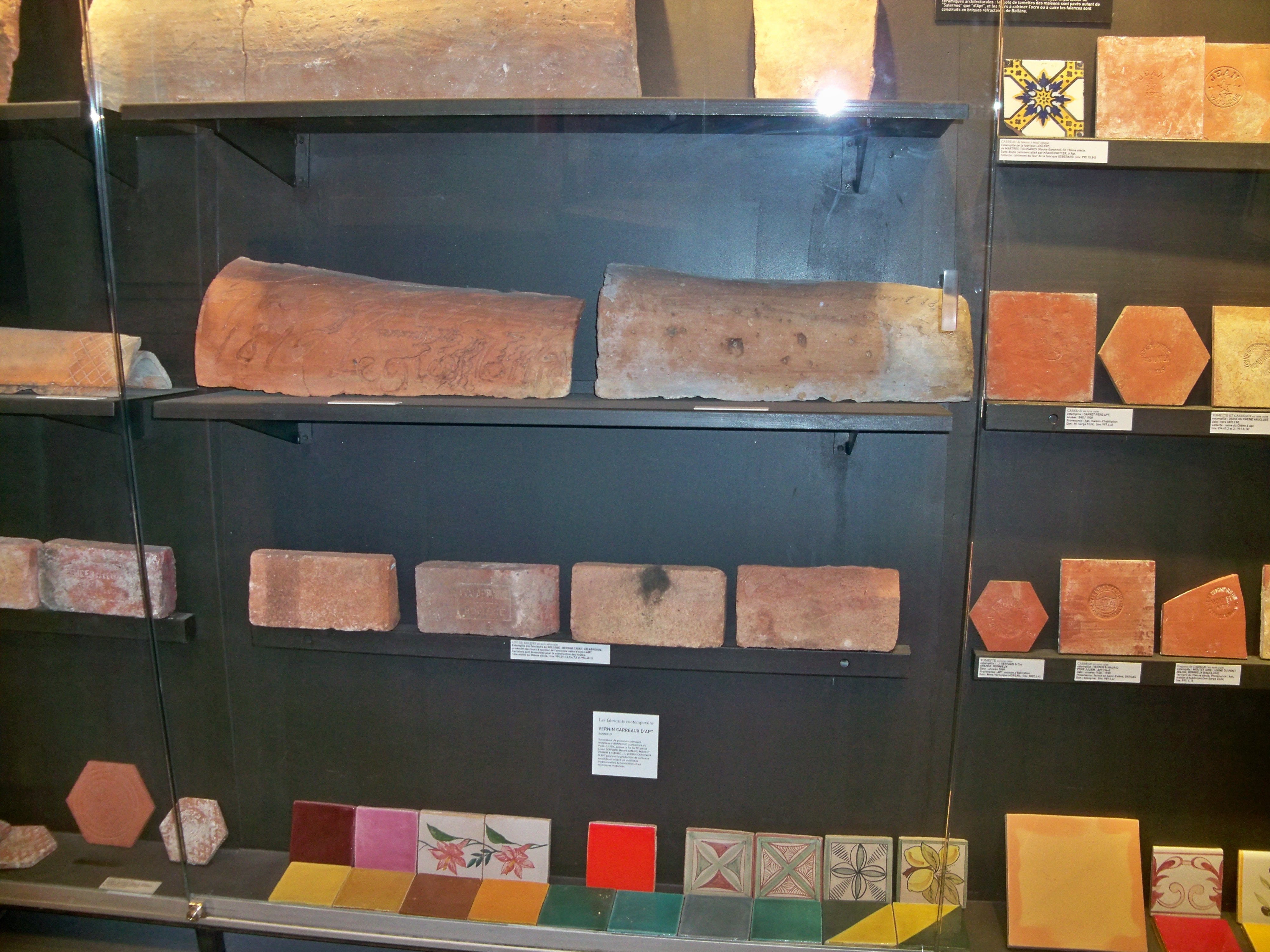 Tuilles et tomettes au Musée de l'Aventure Industrielle (Apt)